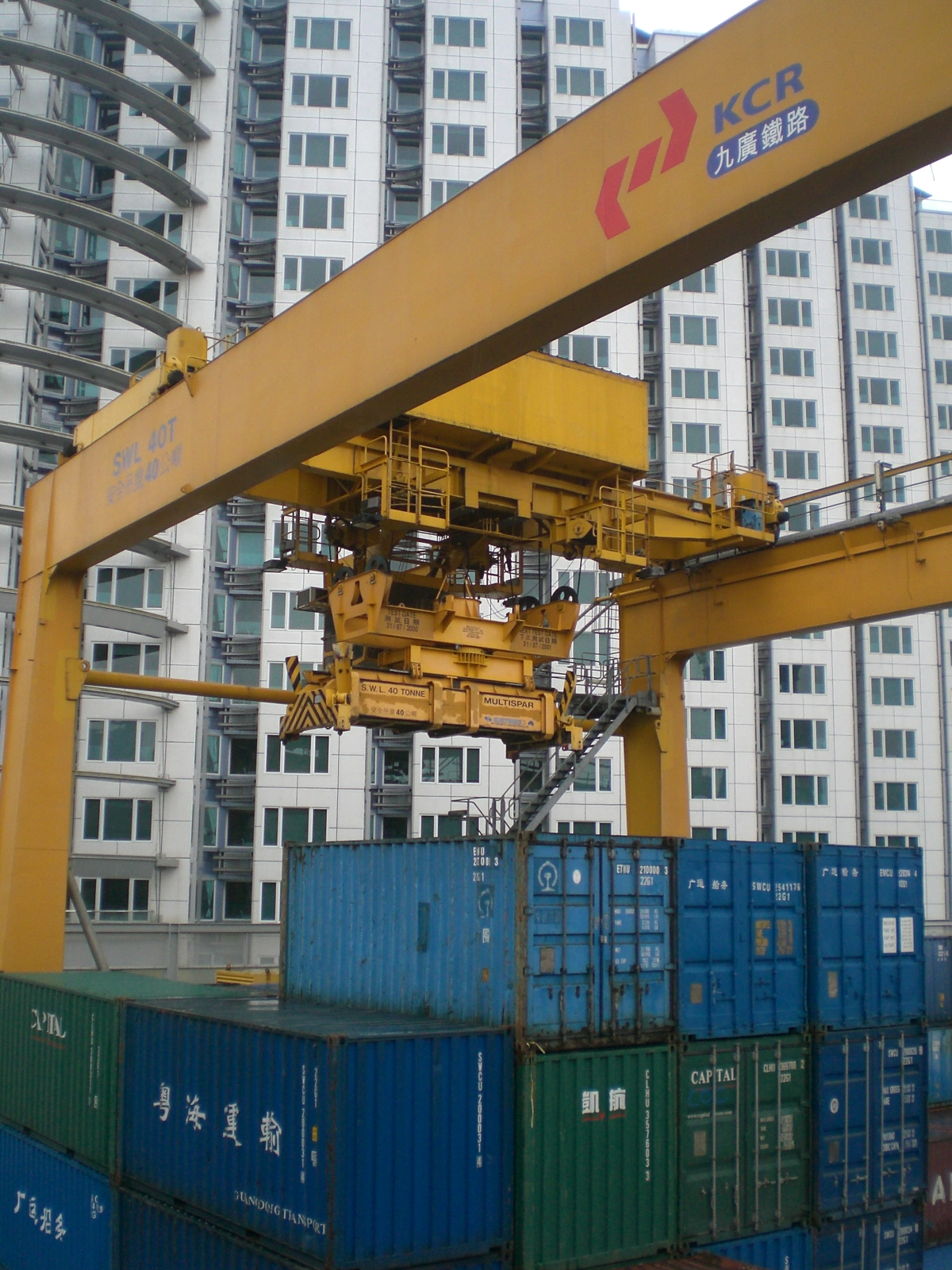 九廣鐵路公司在紅磡站的貨櫃碼頭